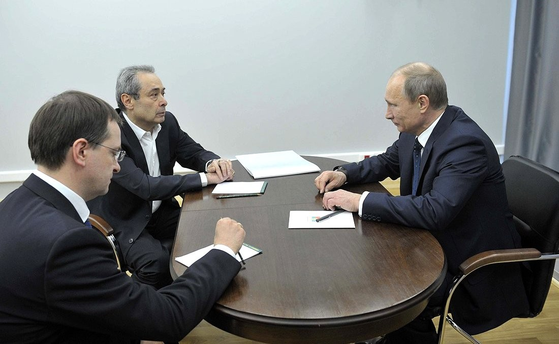 Президент России Владимир Путин, министр культуры Владимир Мединский и художественный руководитель Александринского театра Валерий Фокин.